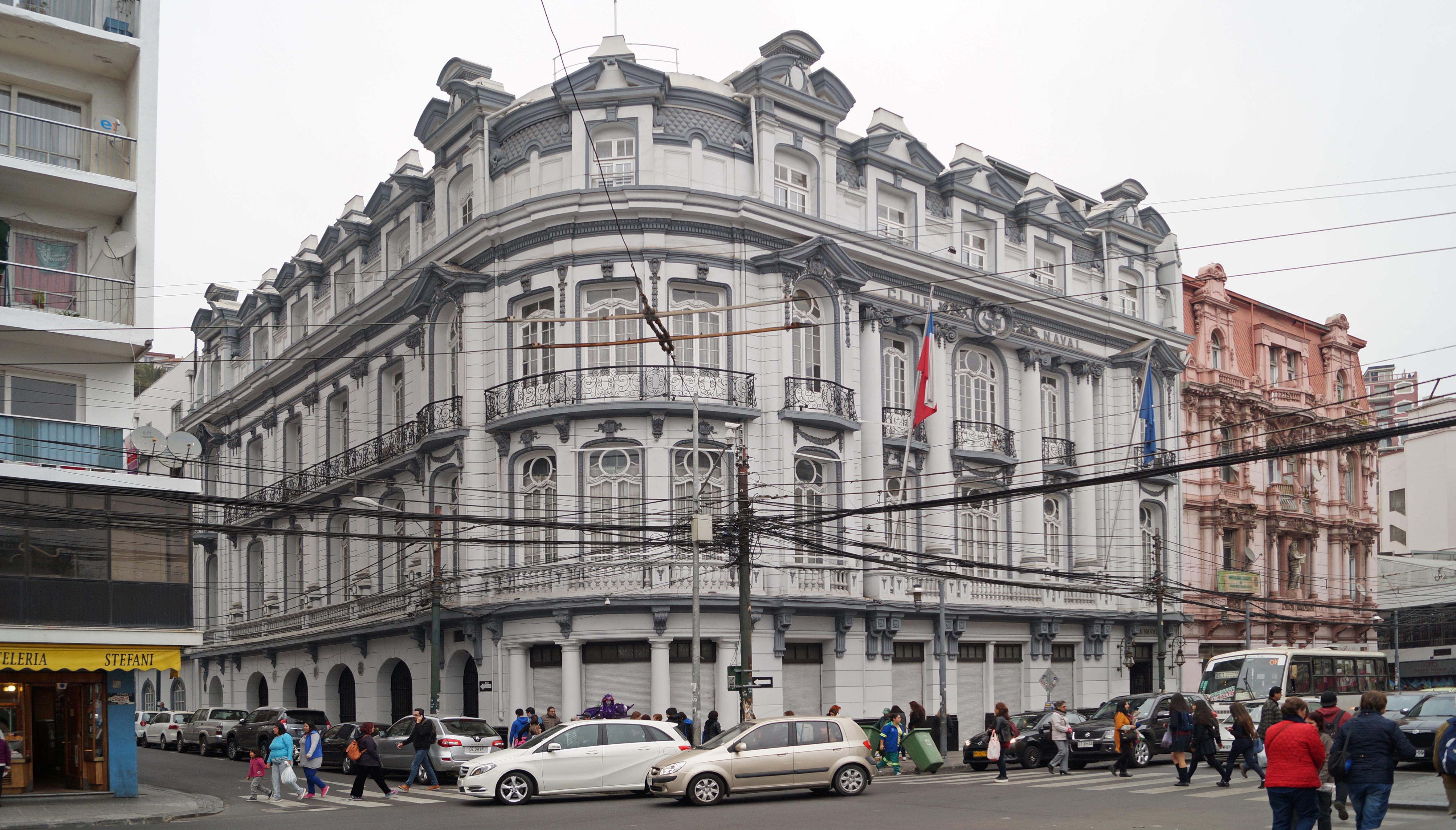 Edificio del Club Naval de Valparaíso, Chile